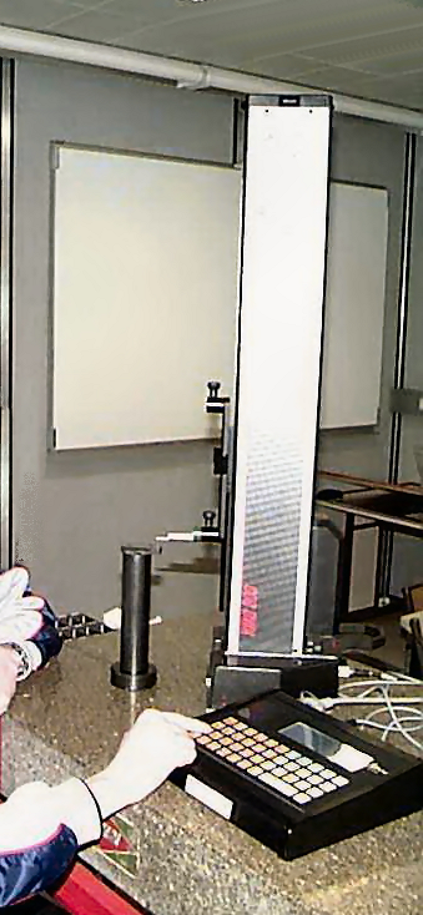 Etalonnage d'une colonne de mesure opérationnelle.